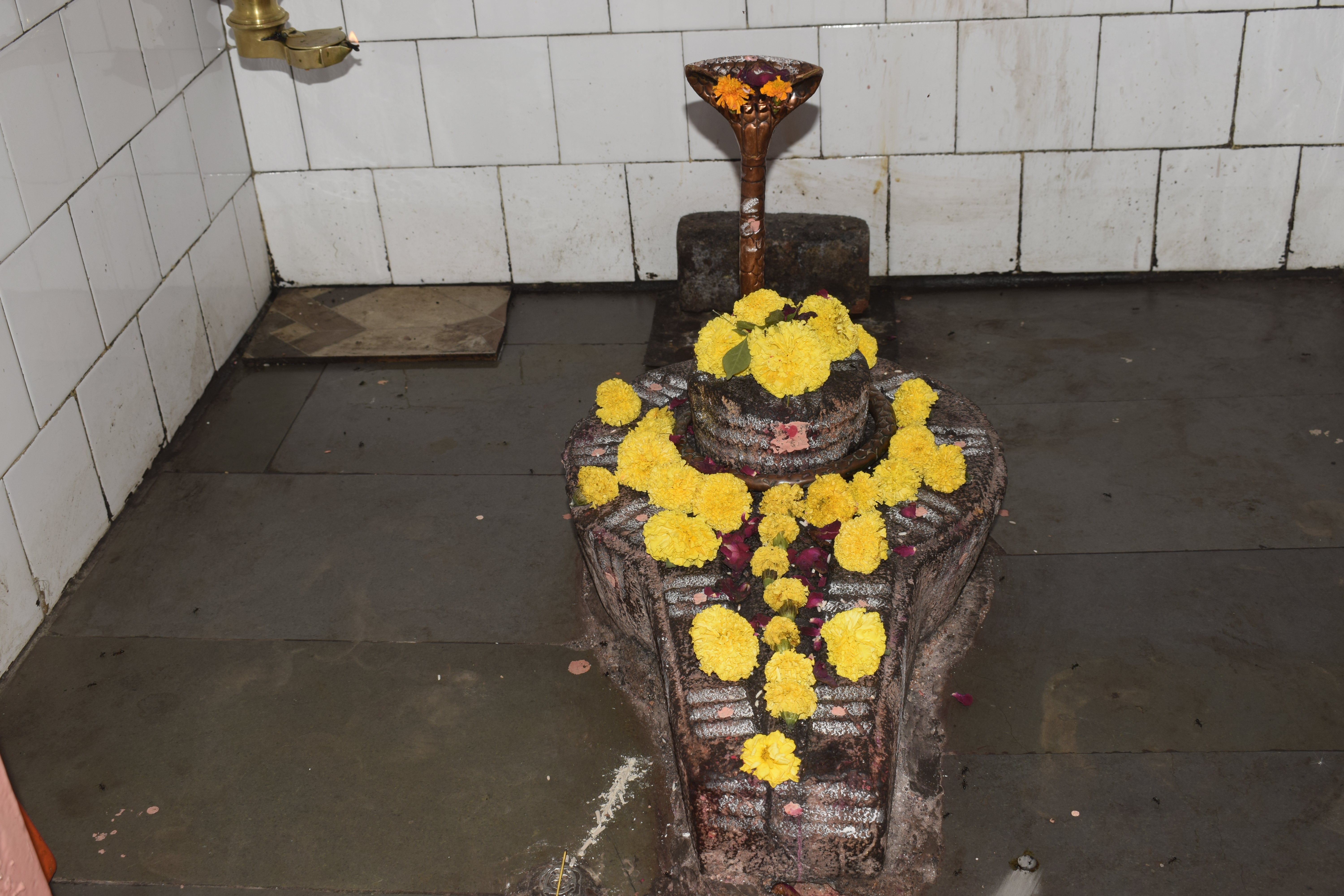 श्री अनंतनामेश्वर लिंग